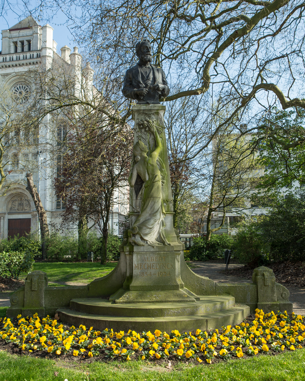 Albert Mechelynck